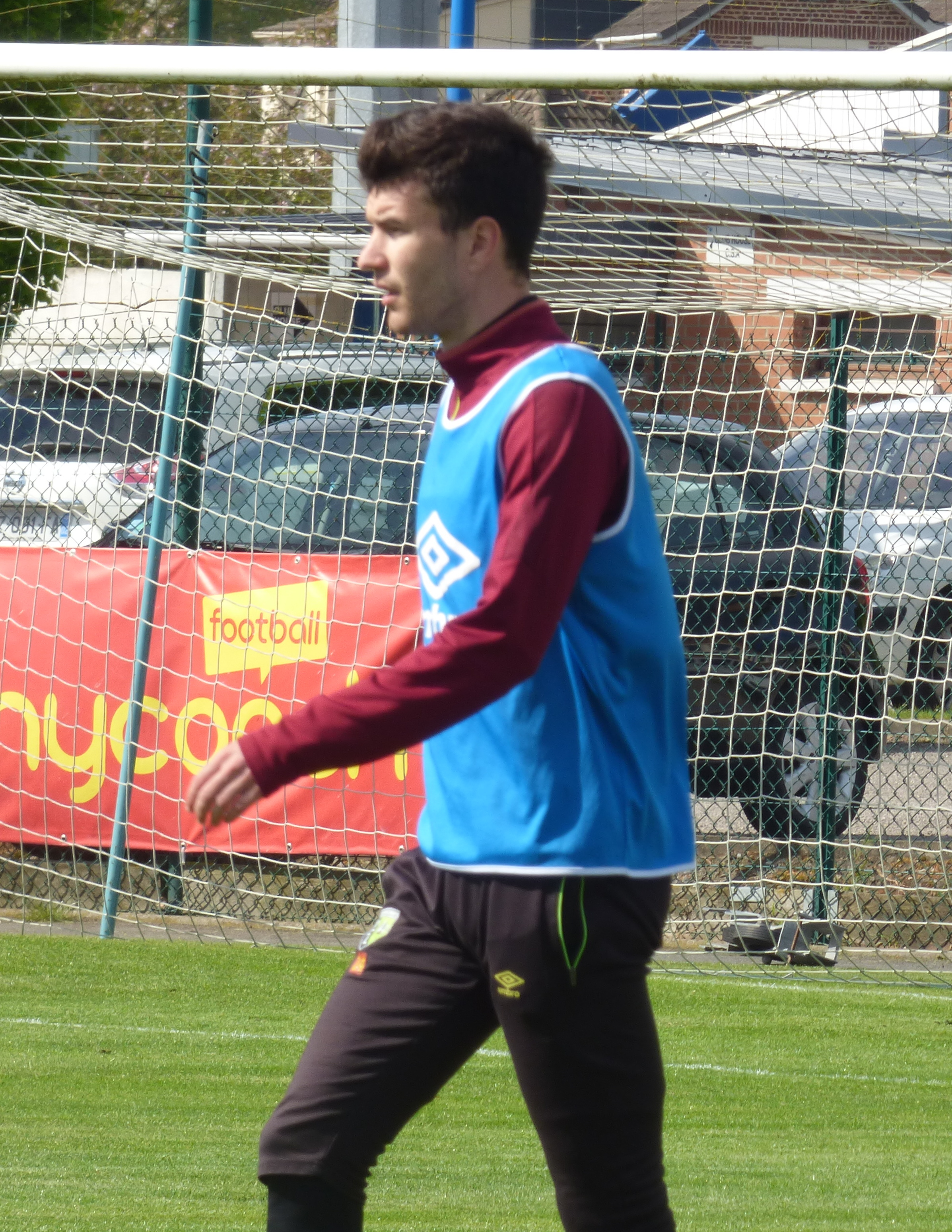 Ivan Lendrić lors d'un entraînement public du Racing Club de Lens au Centre technique et sportif La Gaillette, le 2 mai 2018.